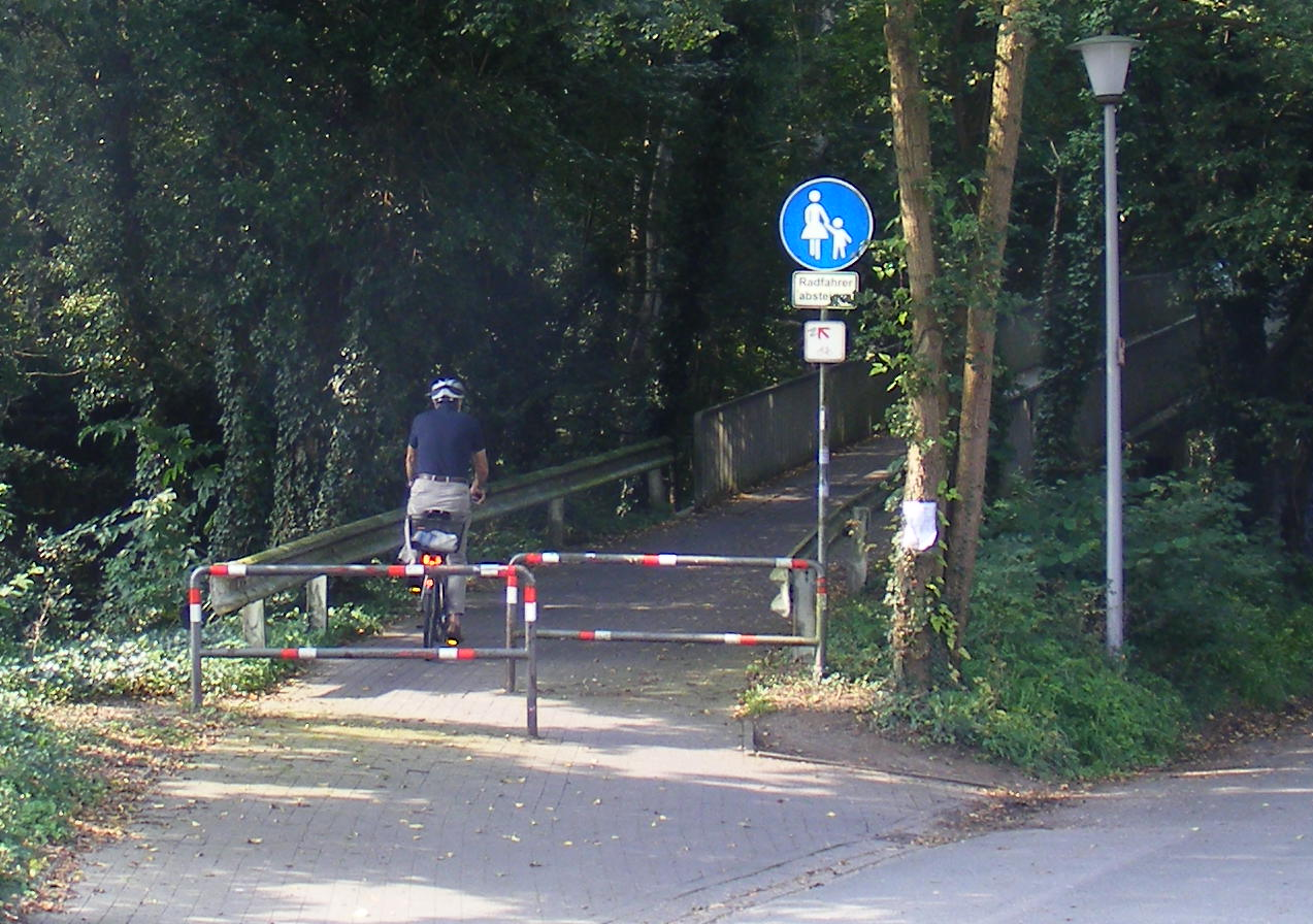 Münster-Sankt Mauritz: Schiebegebot auf Brücke über Schnellstraße